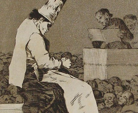 Detalle 1